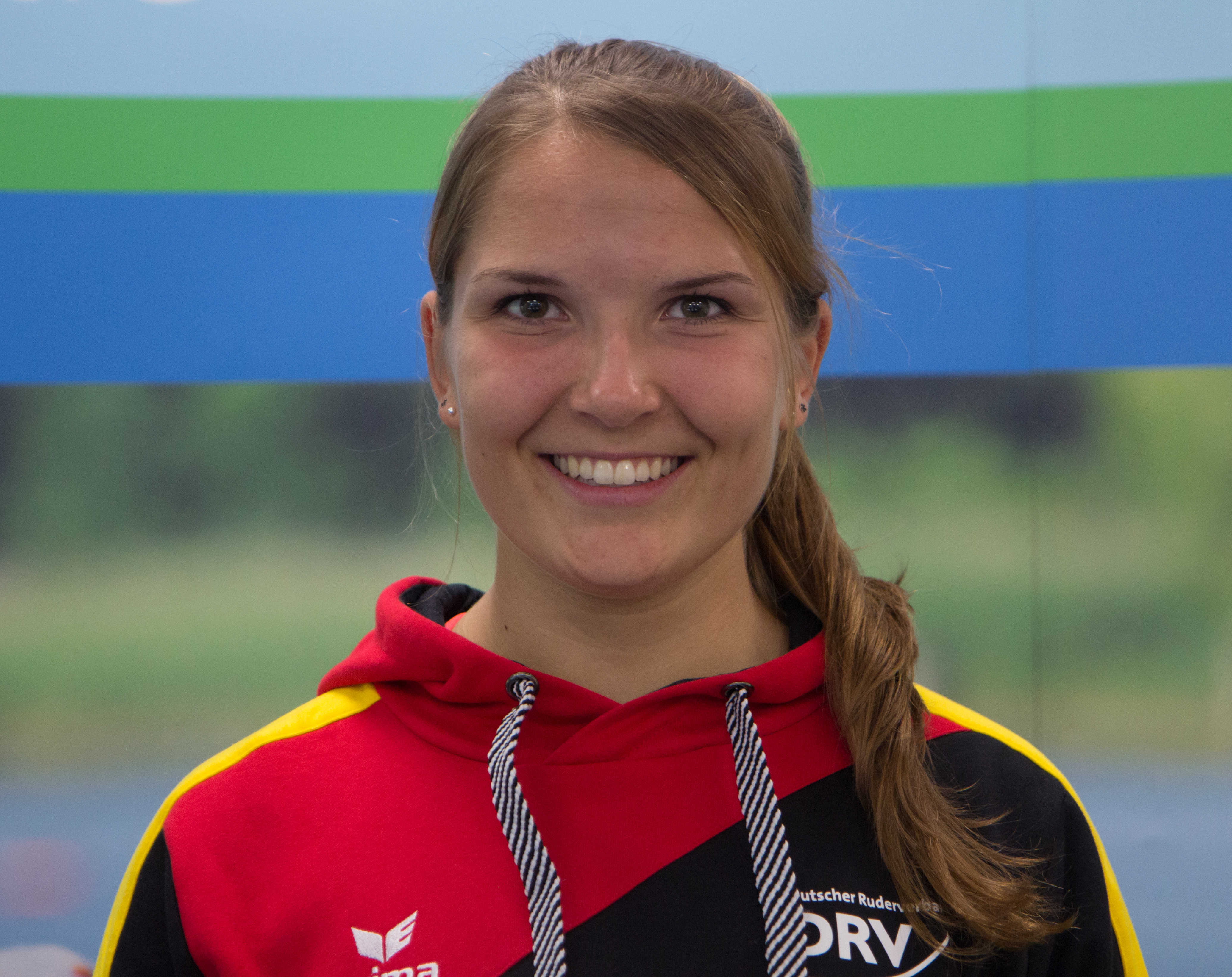 Frauke Hundeling beim Medientag des Deutschen Ruderverbandes am 6. September 2017 in der Ruderakademie in Ratzeburg.